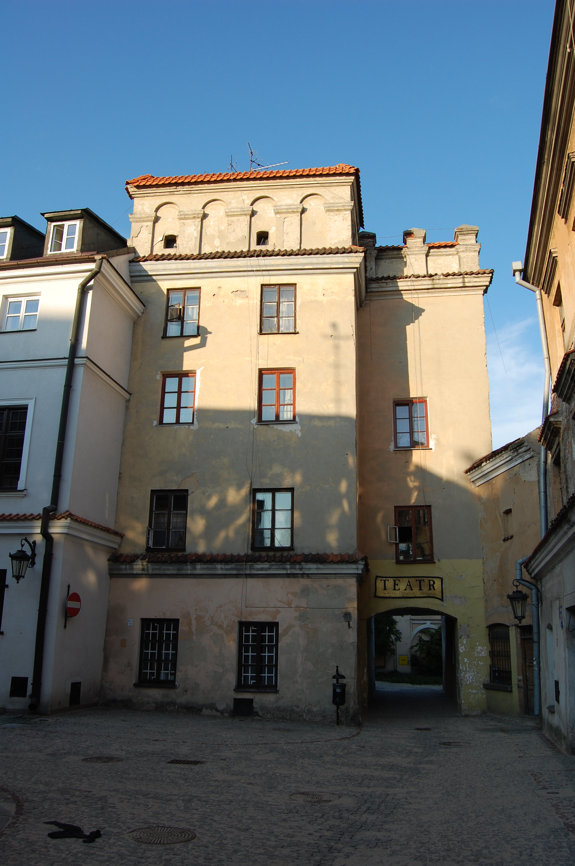 Lublin, Stare Miasto, brama prowadząca do Teatru Lalki i Aktora im. Hansa Christiana Andersena